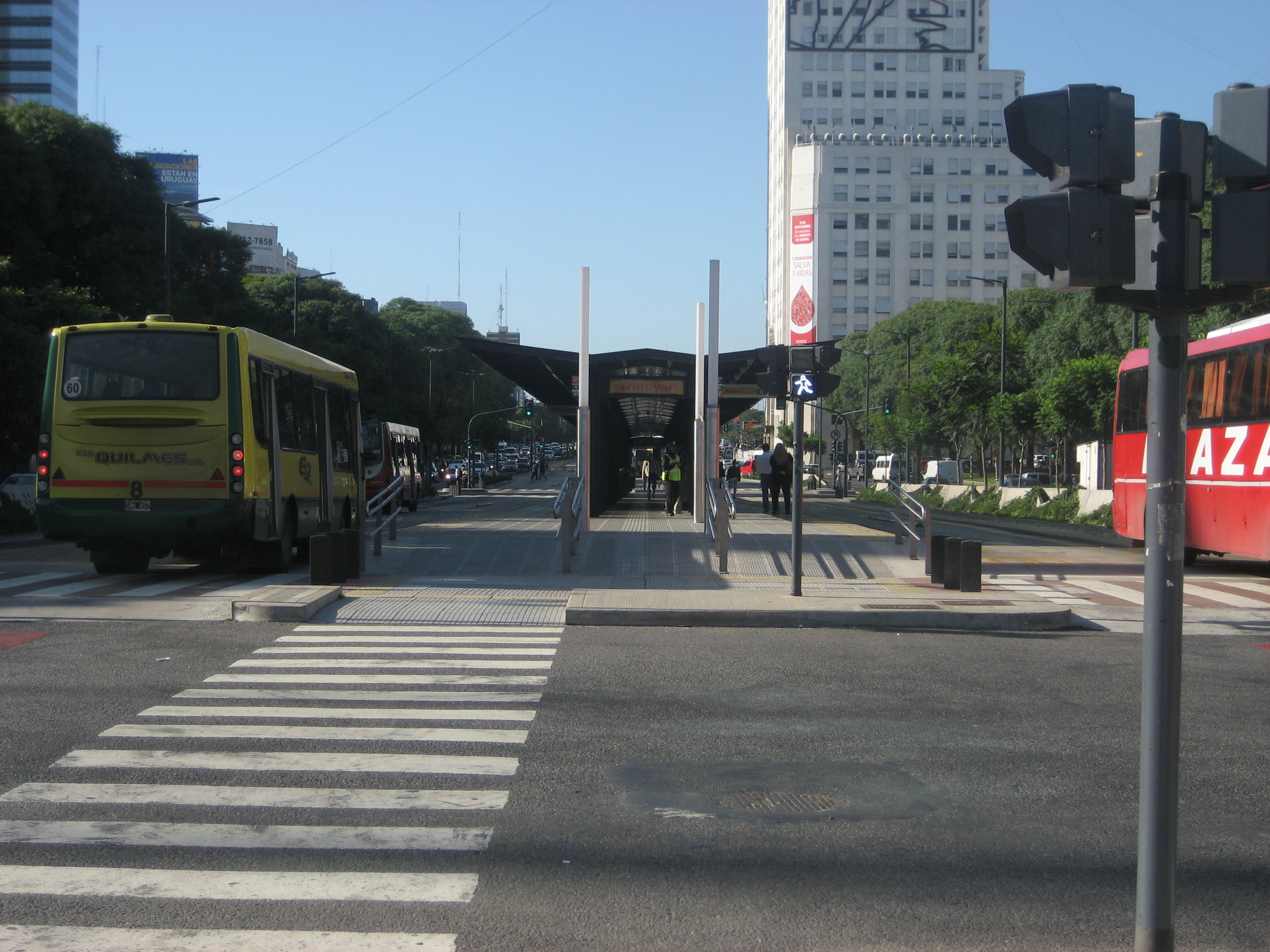 Parada Yrigoyen del Metrobús 9 de Julio, Buenos Aires, vista hacia el Sur